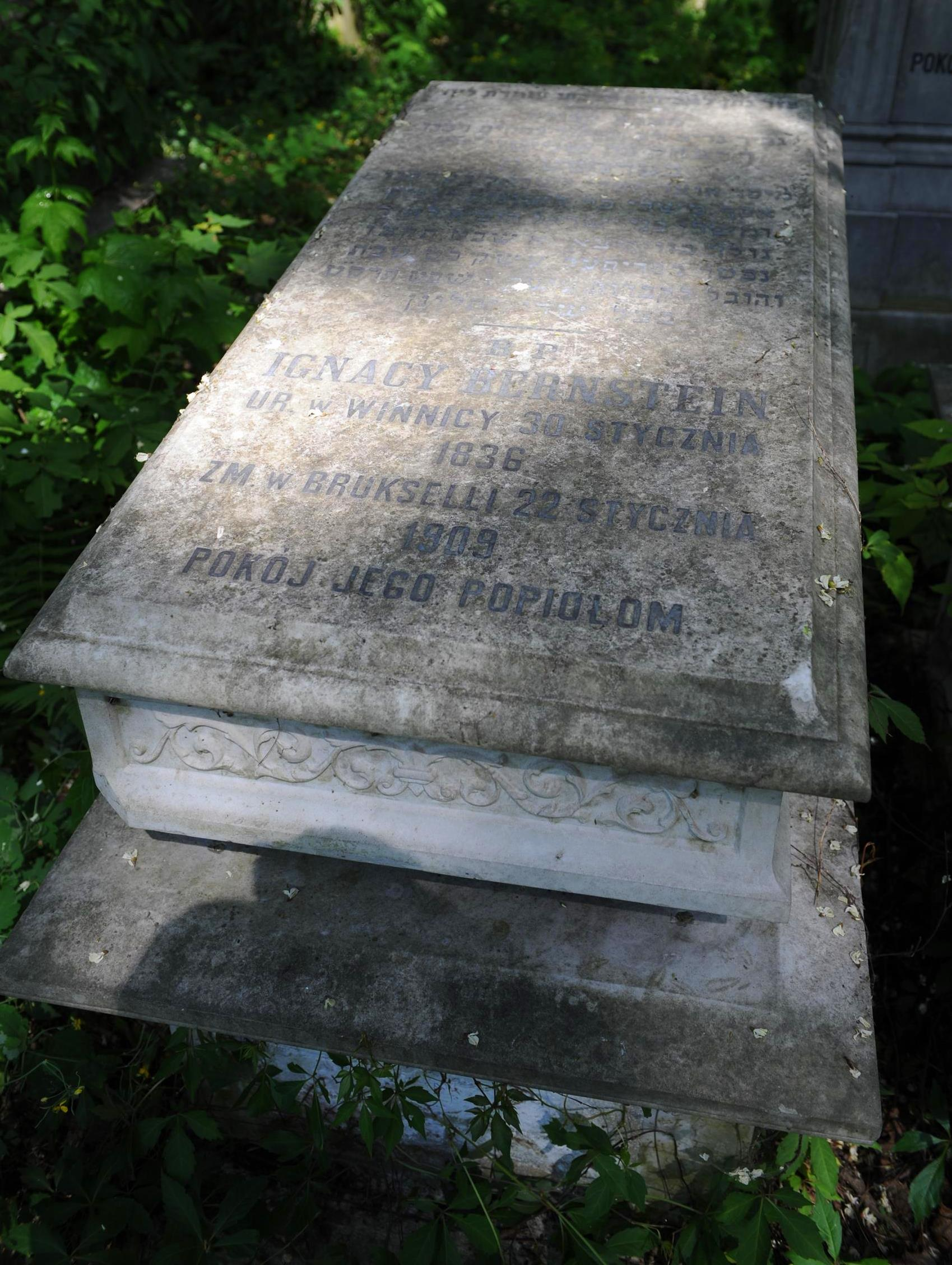 Grób Ignacego Bernsteina na Cmentarzu Żydowskim w Warszawie